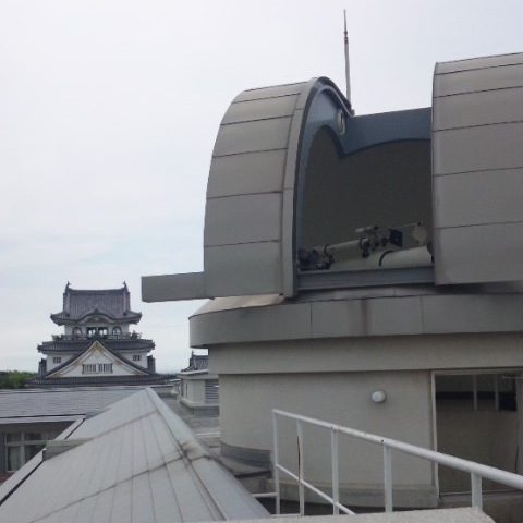 屋上ドーム